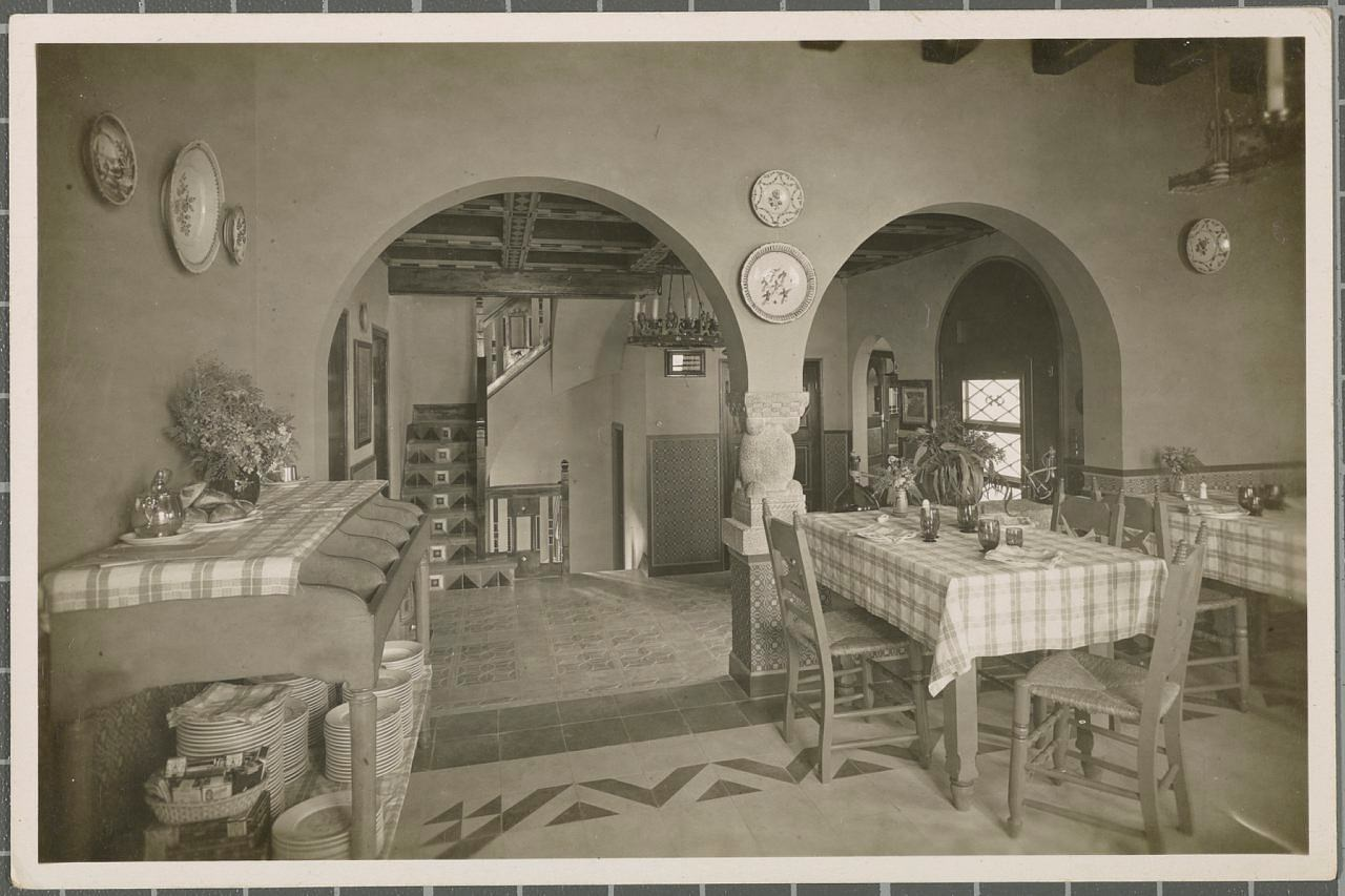 Un dels menjadors de l'Hostal de la Gavina, obra de Rafael Masó.